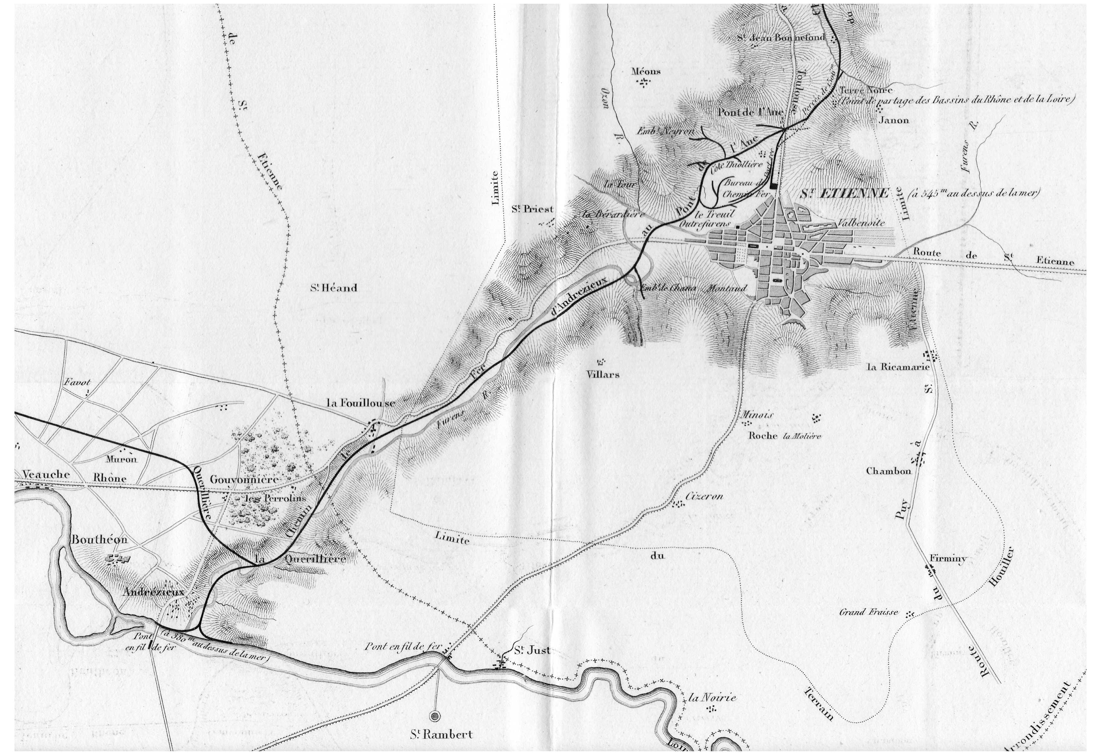 Carte du chemin de fer de Saint-Étienne à Andrezieux. Attention! l'orientation est Nord = gauche, Sud = droite